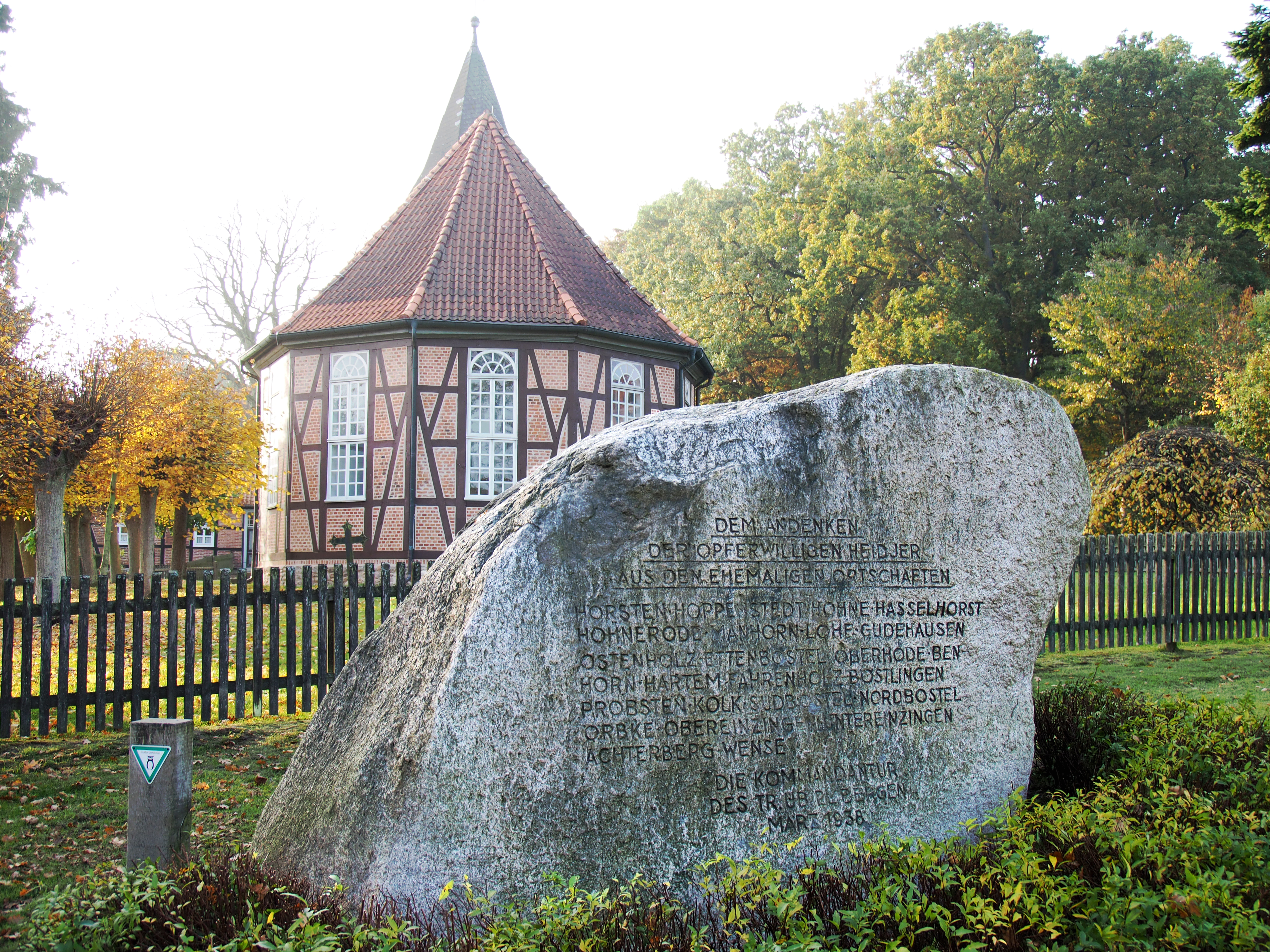 Hoher Stein an der Kirche in Ostenholz im gemeindefreien Bezirk Osterheide im Landkreis Heidekreis - nach seinem Fundort der Wüstung Hanglüß „Der Riese von Hanglüß“ genannt